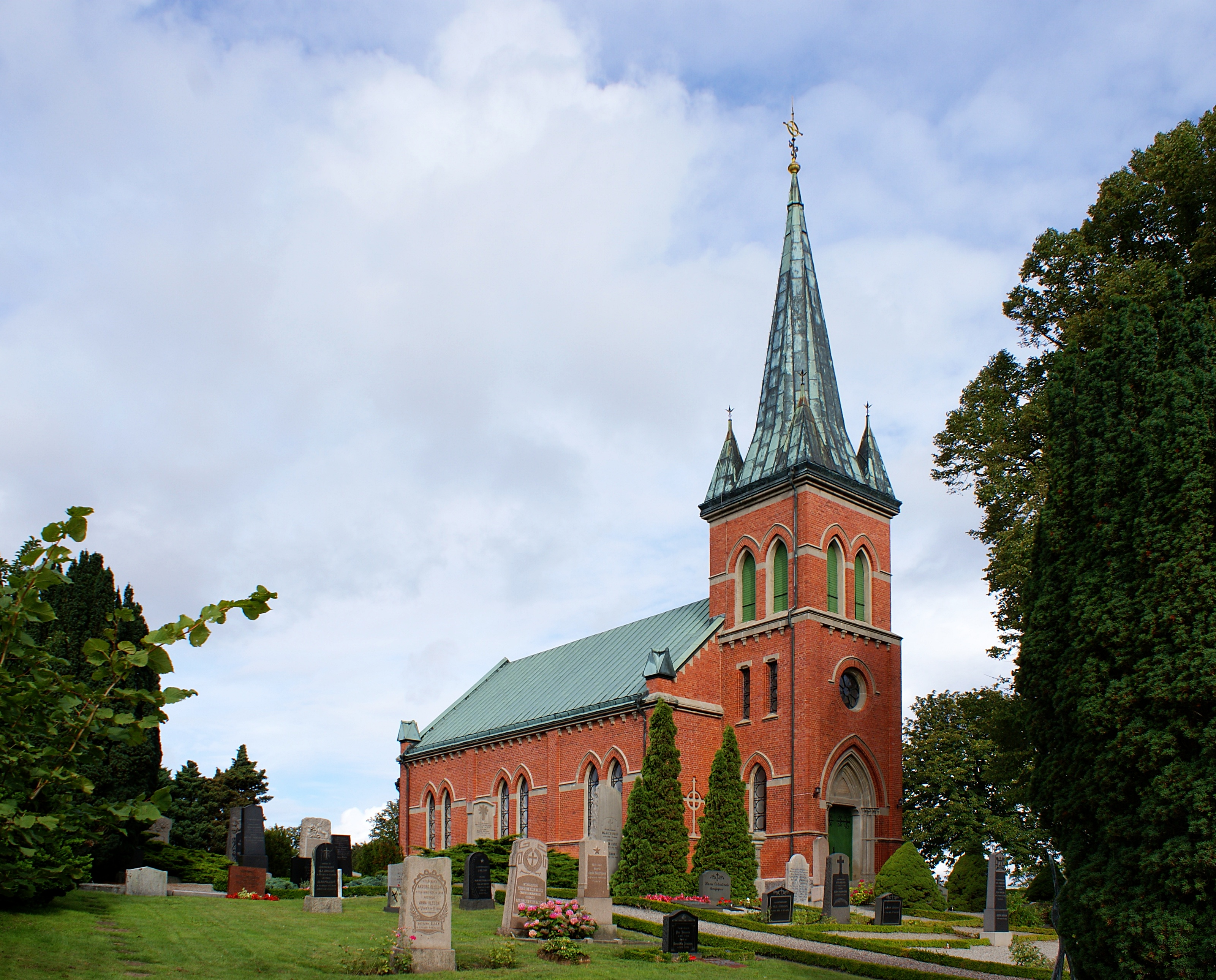 Östra Grevie kyrka